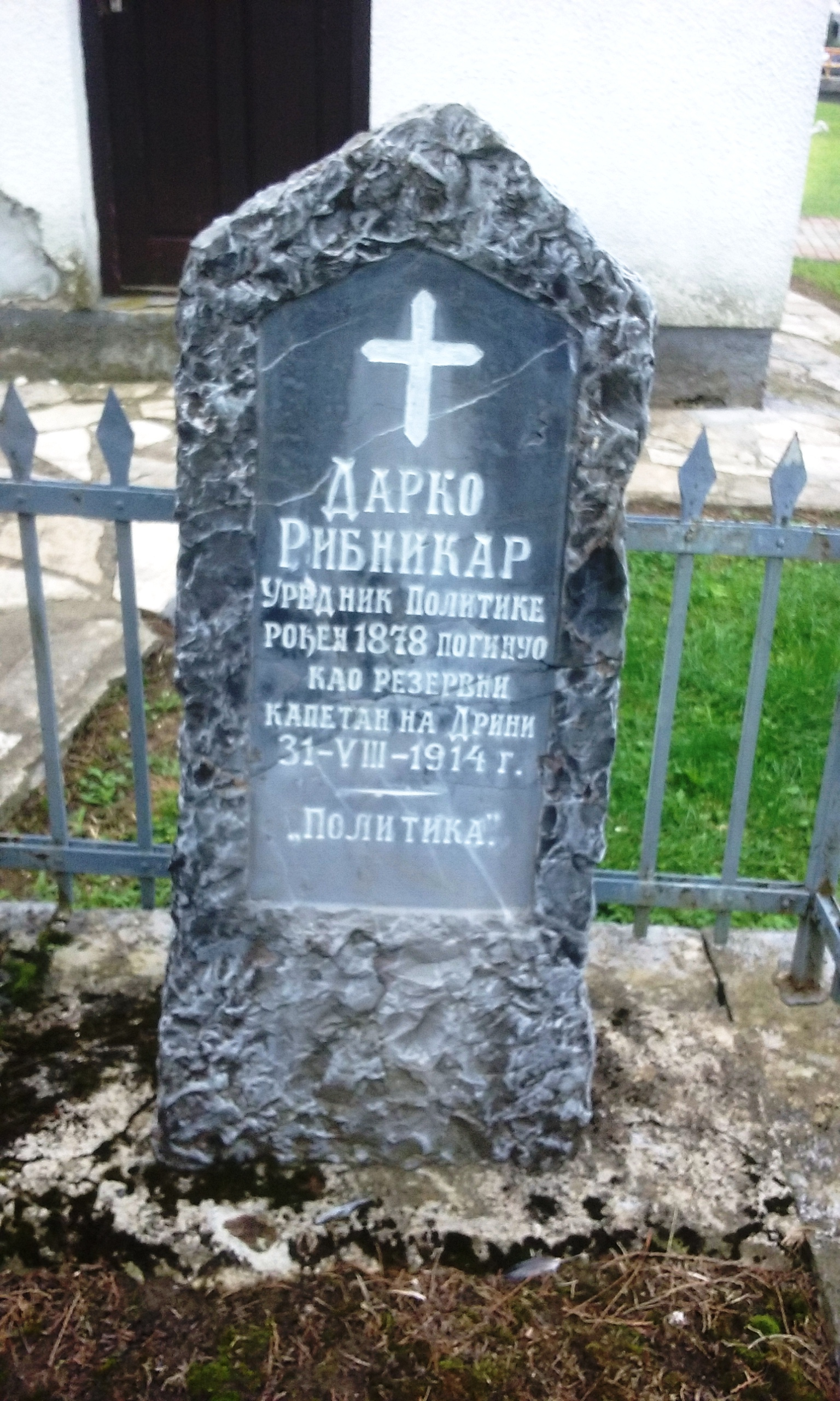 Гроб Дарка Рибникара у порти цркве у Белој Цркви, код Крупња